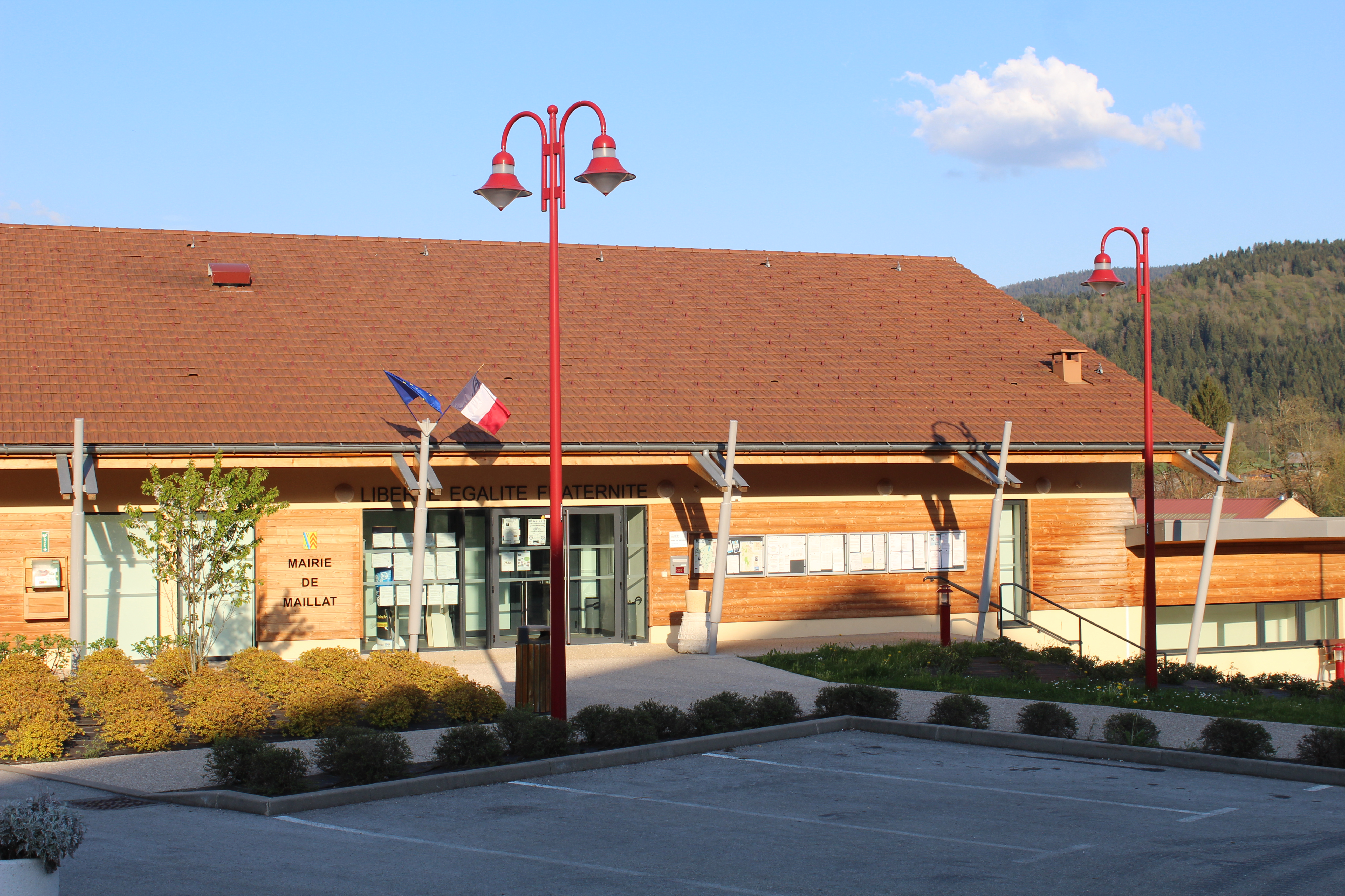 Mairie de Maillat.